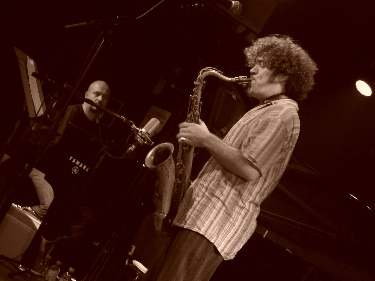 Julien Lourau et Bojan Zulfikarpašić en duo au New Morning, Paris